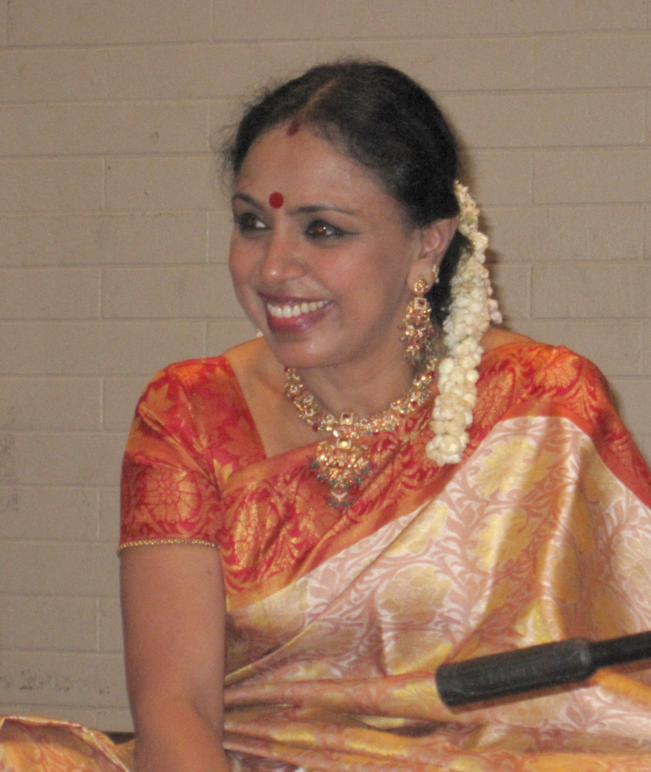 சுதா இரகுநாதன்